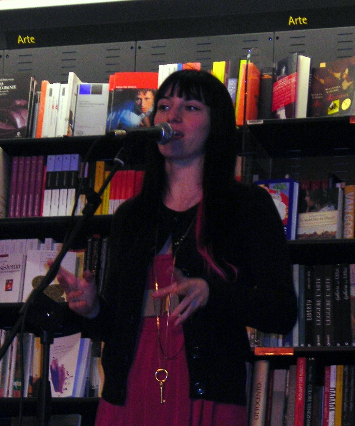 Promotion à Rome, Italie.